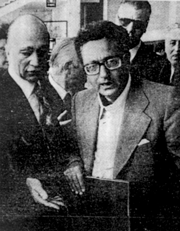 Pino Rauti, con Giorgio Almirante, quando rientrò nel MSI nel 1969